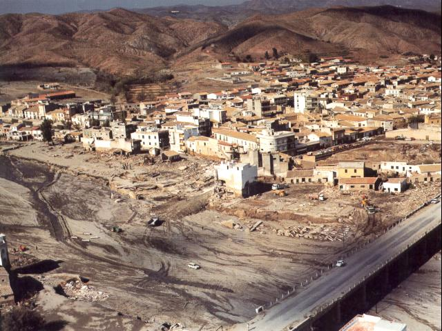 Vista de la Rambla de Nogalte tras la ríada de 1973